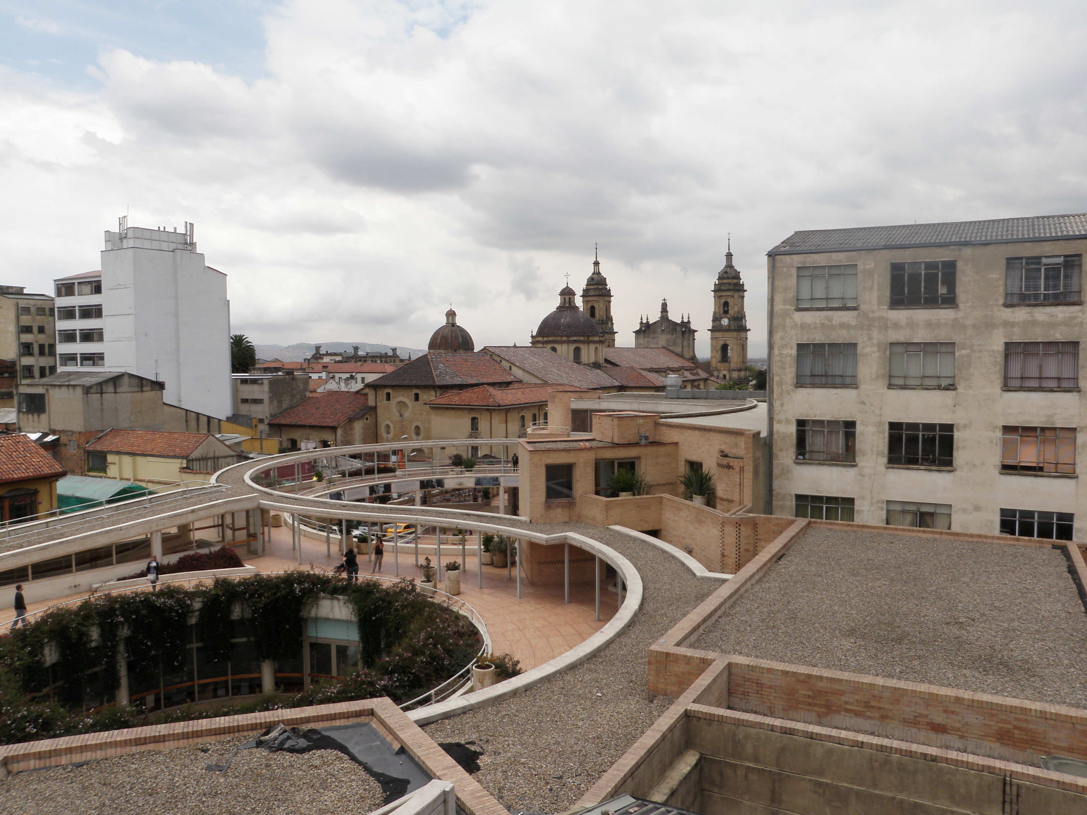 Sector Antiguo de la Ciudad de Bogotá